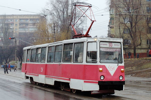 KTM-5 554 in Mariupol